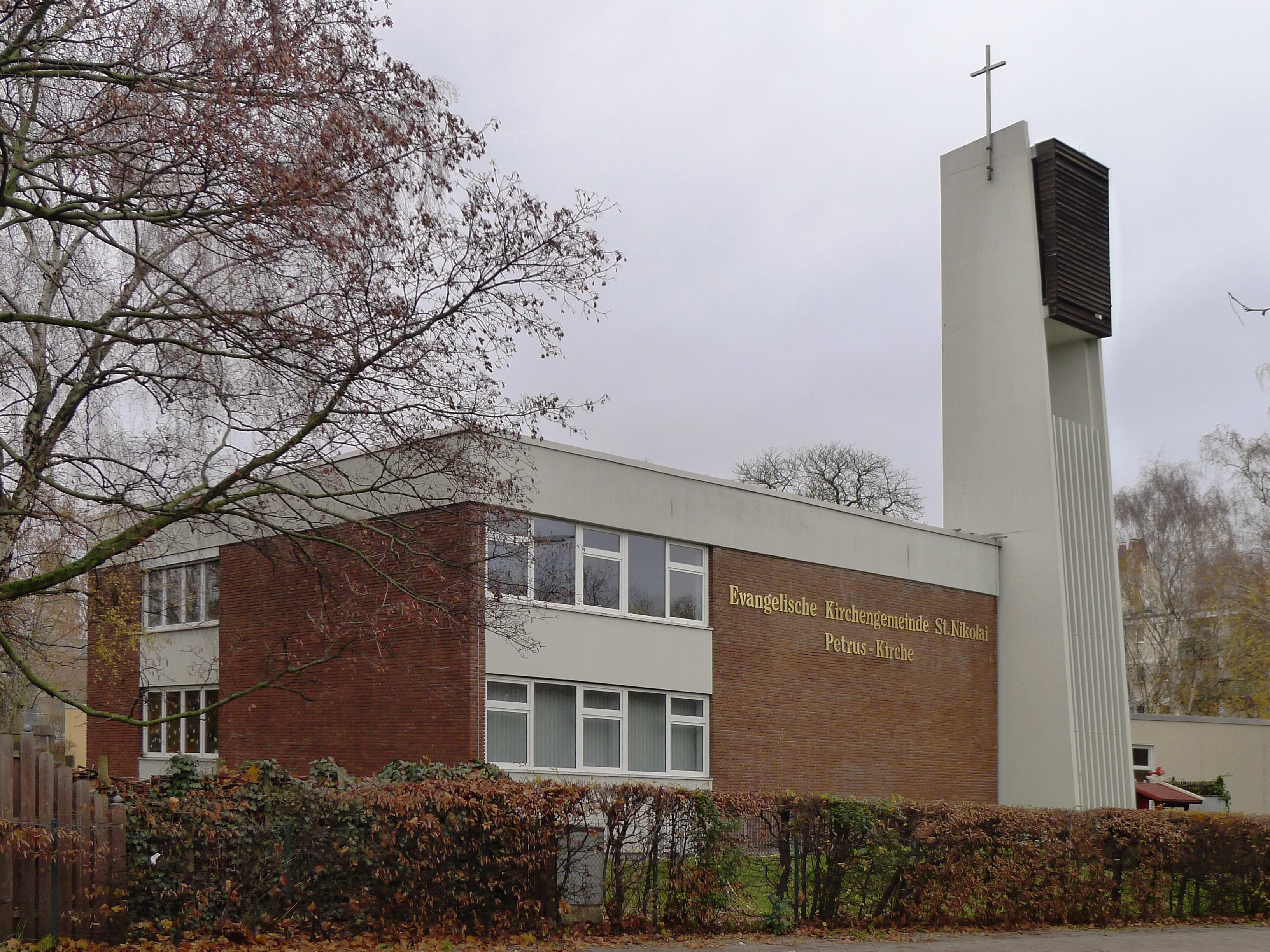 Blick auf das Gemeindezentrum mit der Kirche